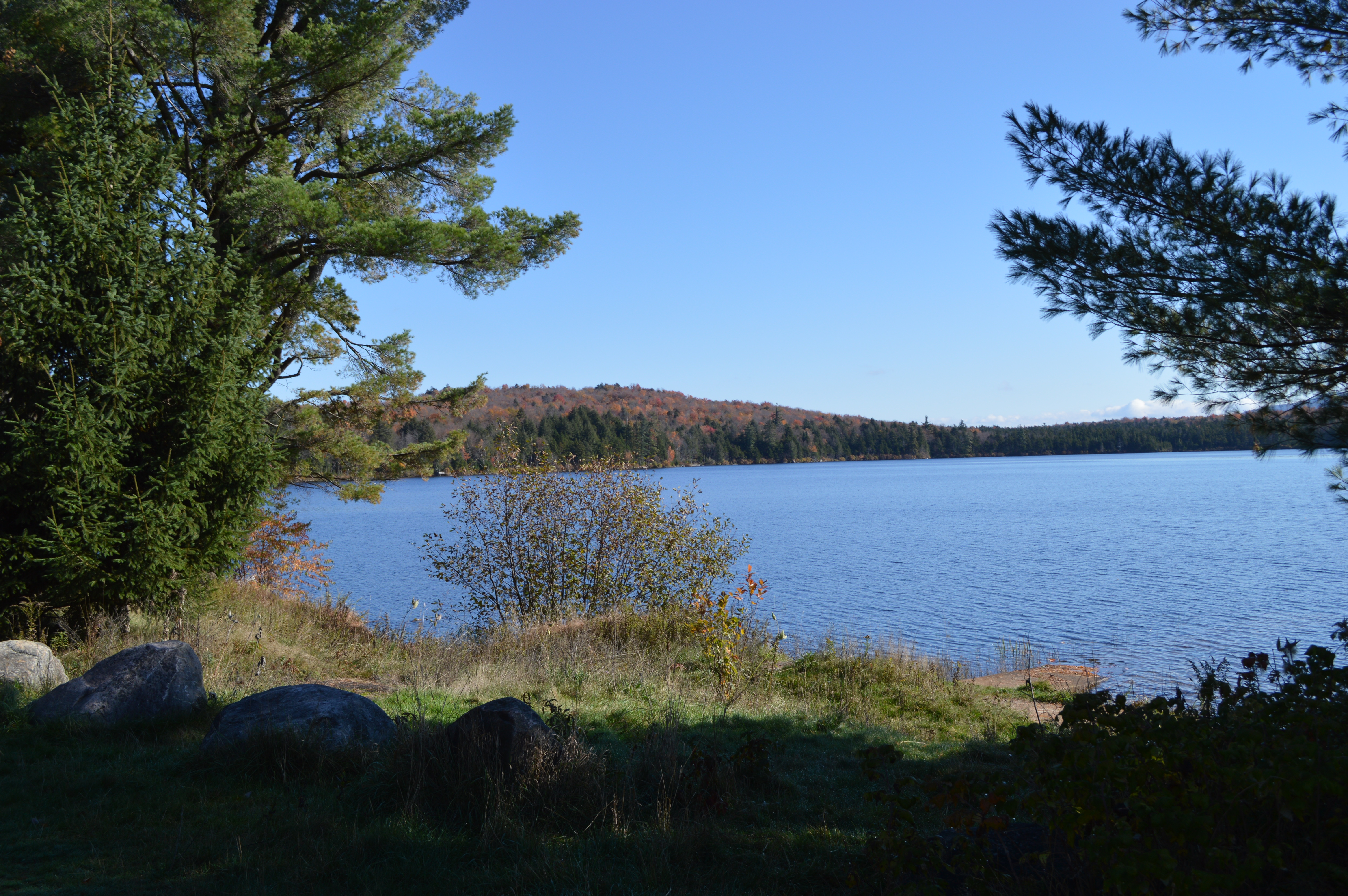 Piercefield, NY, USA